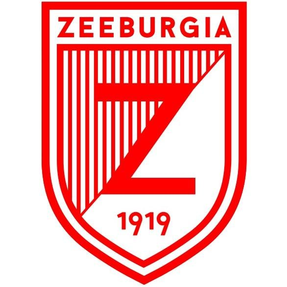 Logo Zeeburgia